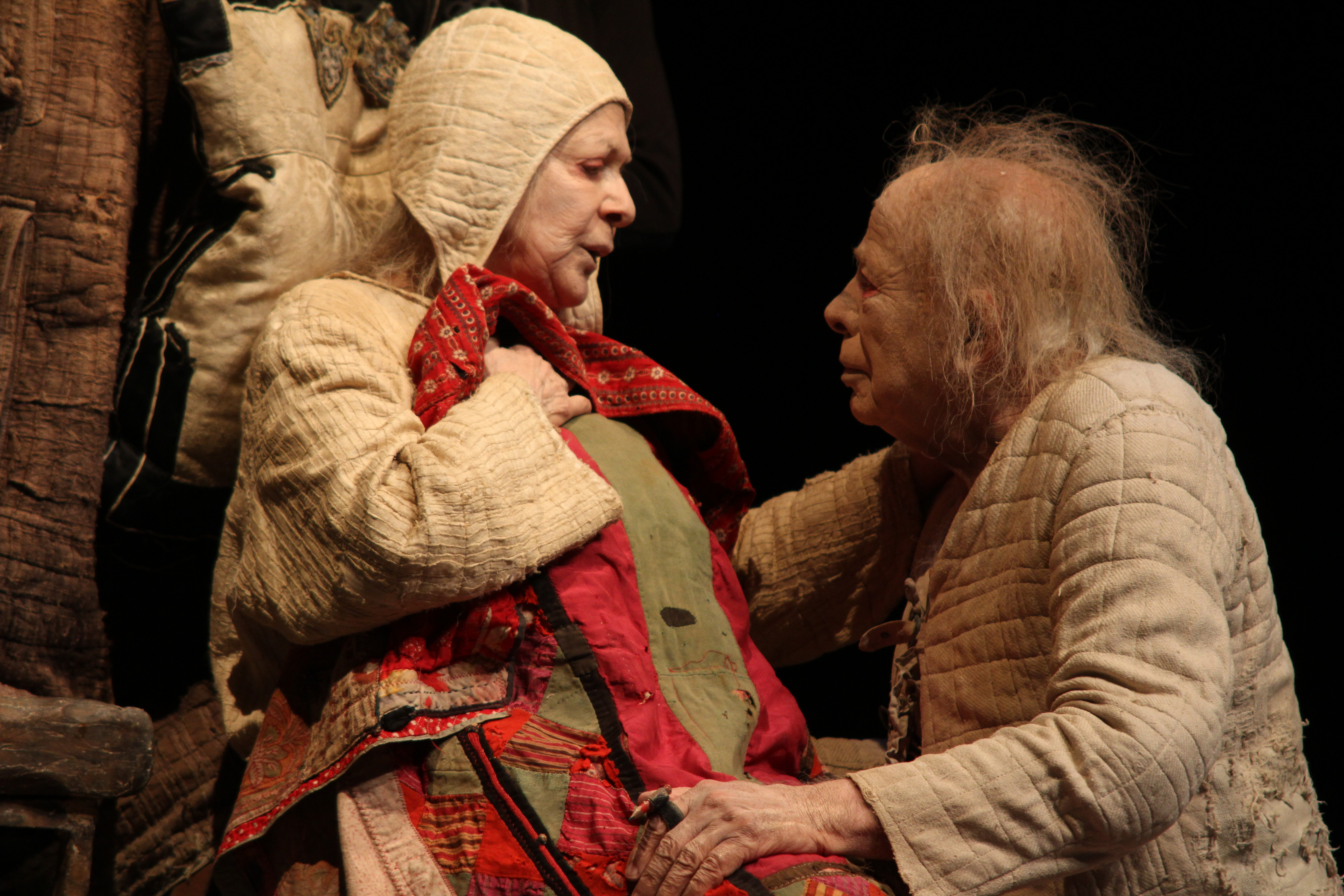 רבקה גור ויוסף כרמון בהצגה "אשכבה"